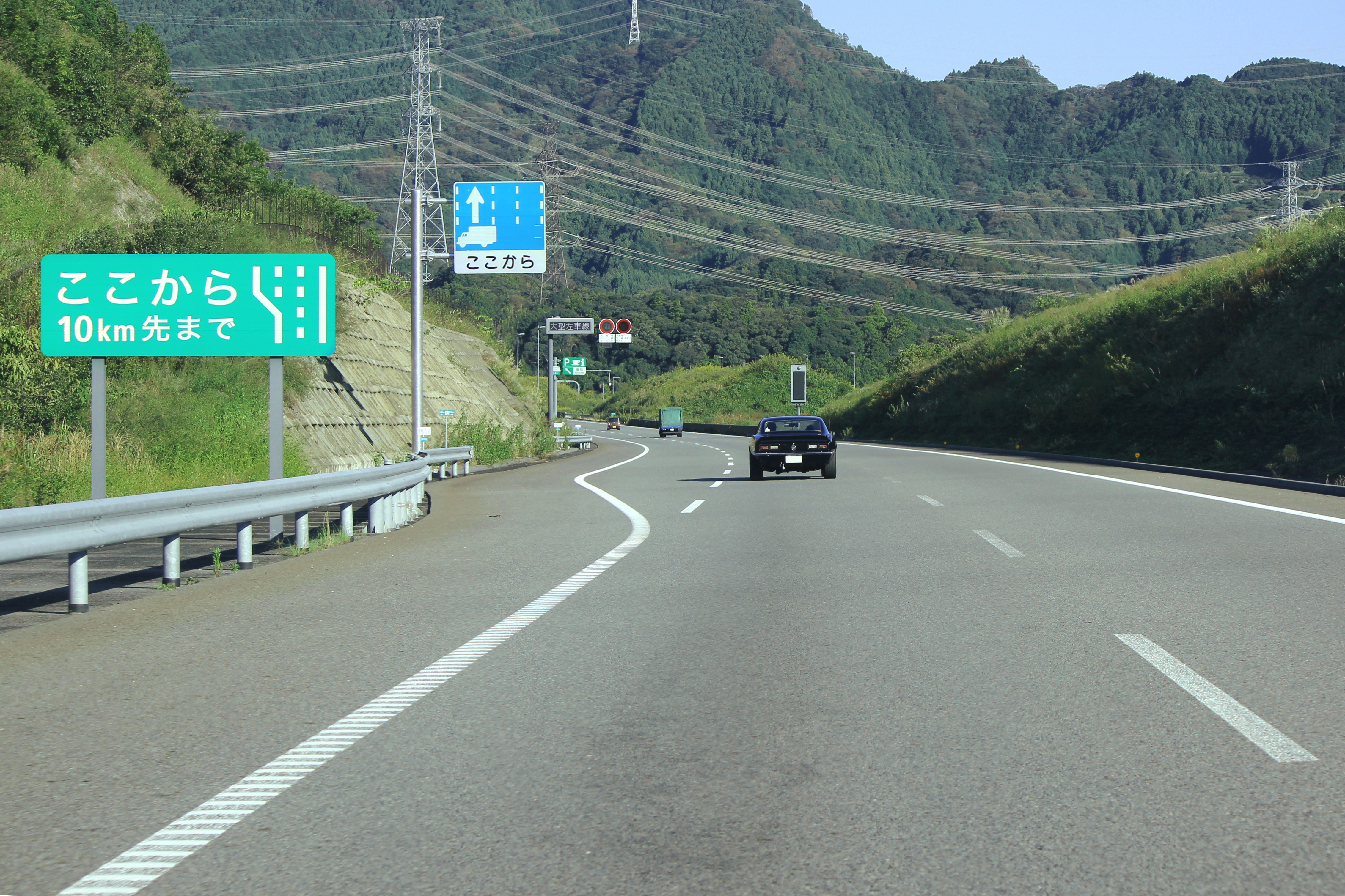 新東名高速道路の2車線から3車線区間への移行部